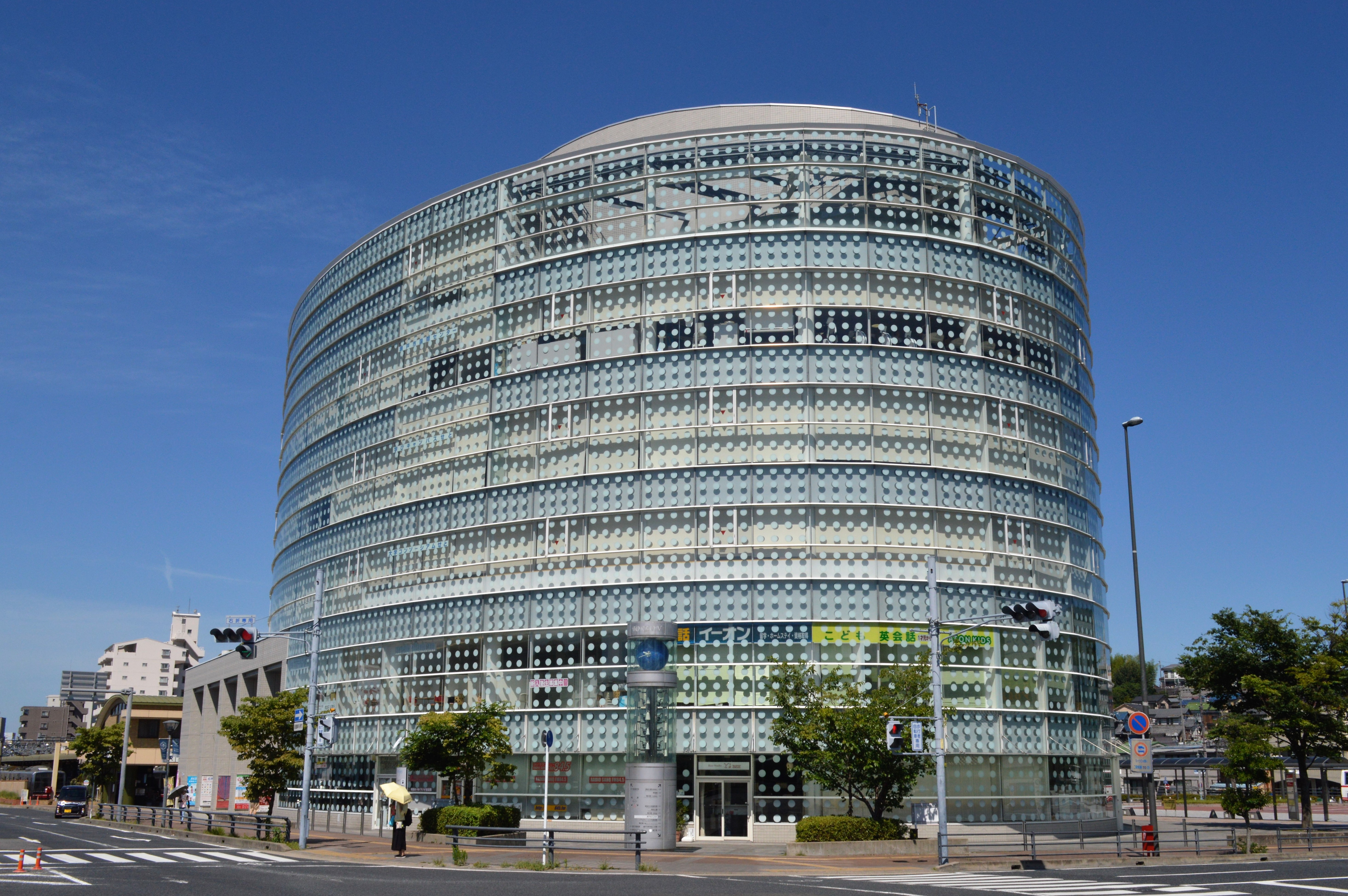 愛知県瀬戸市のパルティせと。